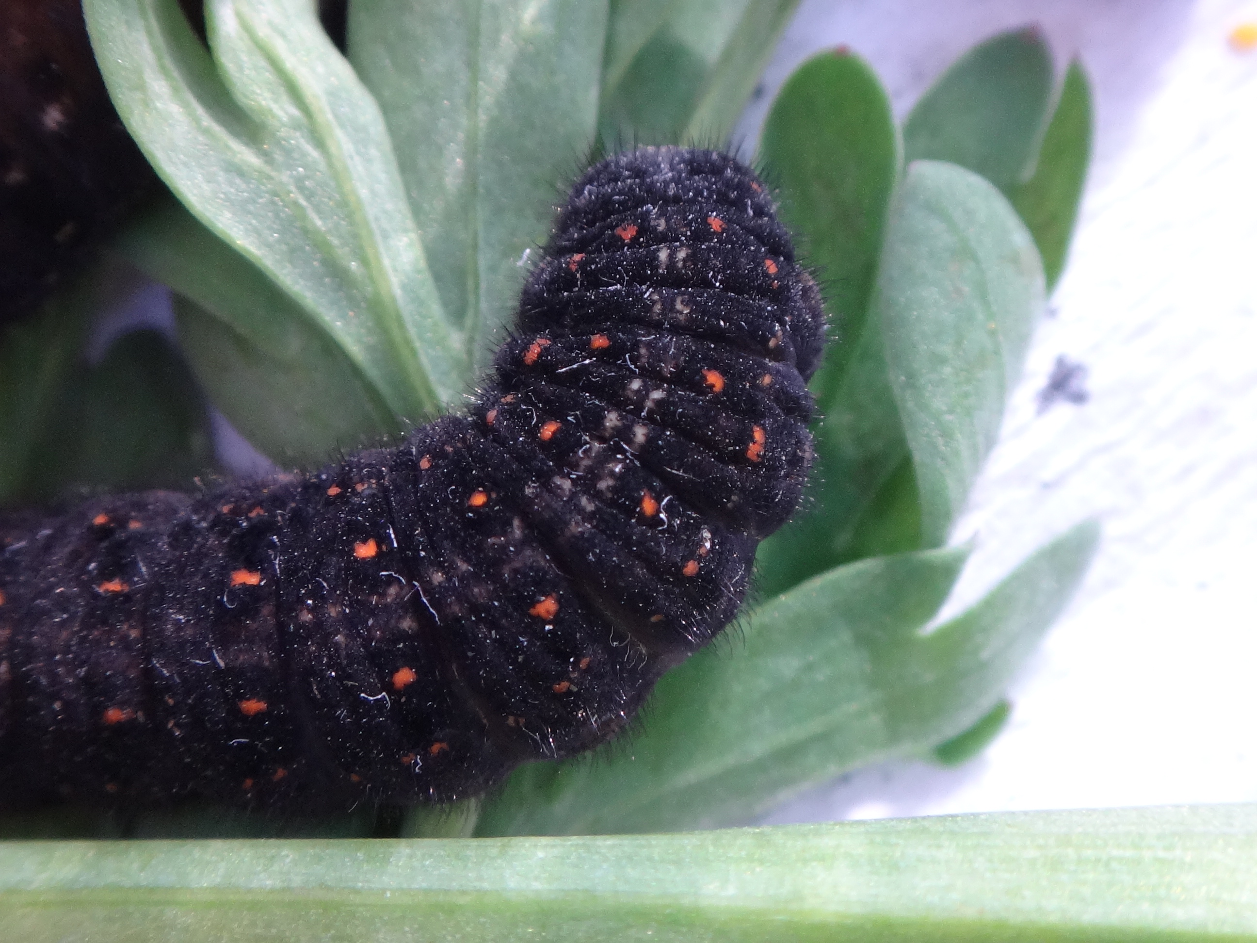 Parnassius delphius larva